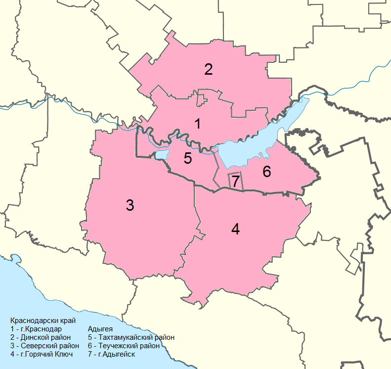 Краснодарская городская агломерация